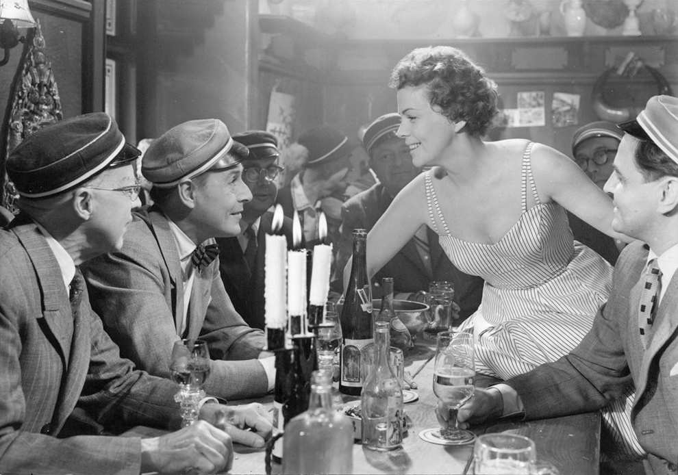 Film "Sjunde himlen", 1956. Hasse Ekman, Sickan Carlsson m.fl.